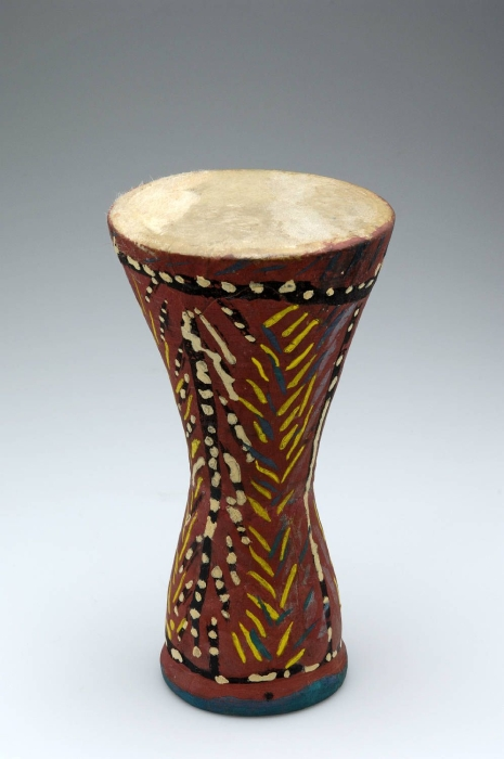 Het vel van deze bekertrom is op het tromlichaam van aardewerk gelijmd. Het tromlichaam is beschilderd met geometrische motieven. De onderkant van het tromlichaam is open.